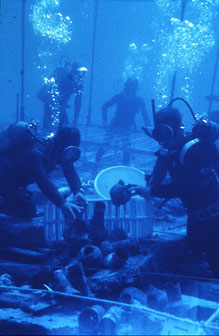 צוללים מכינים ממצאים להצפה, ברקע מגדל הצילום